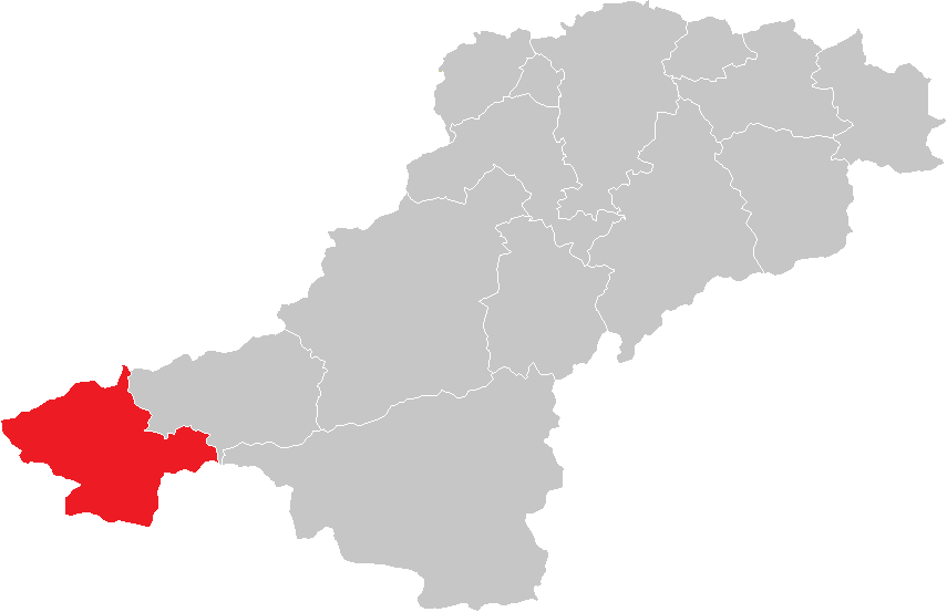 Bezirk Lilienfeld